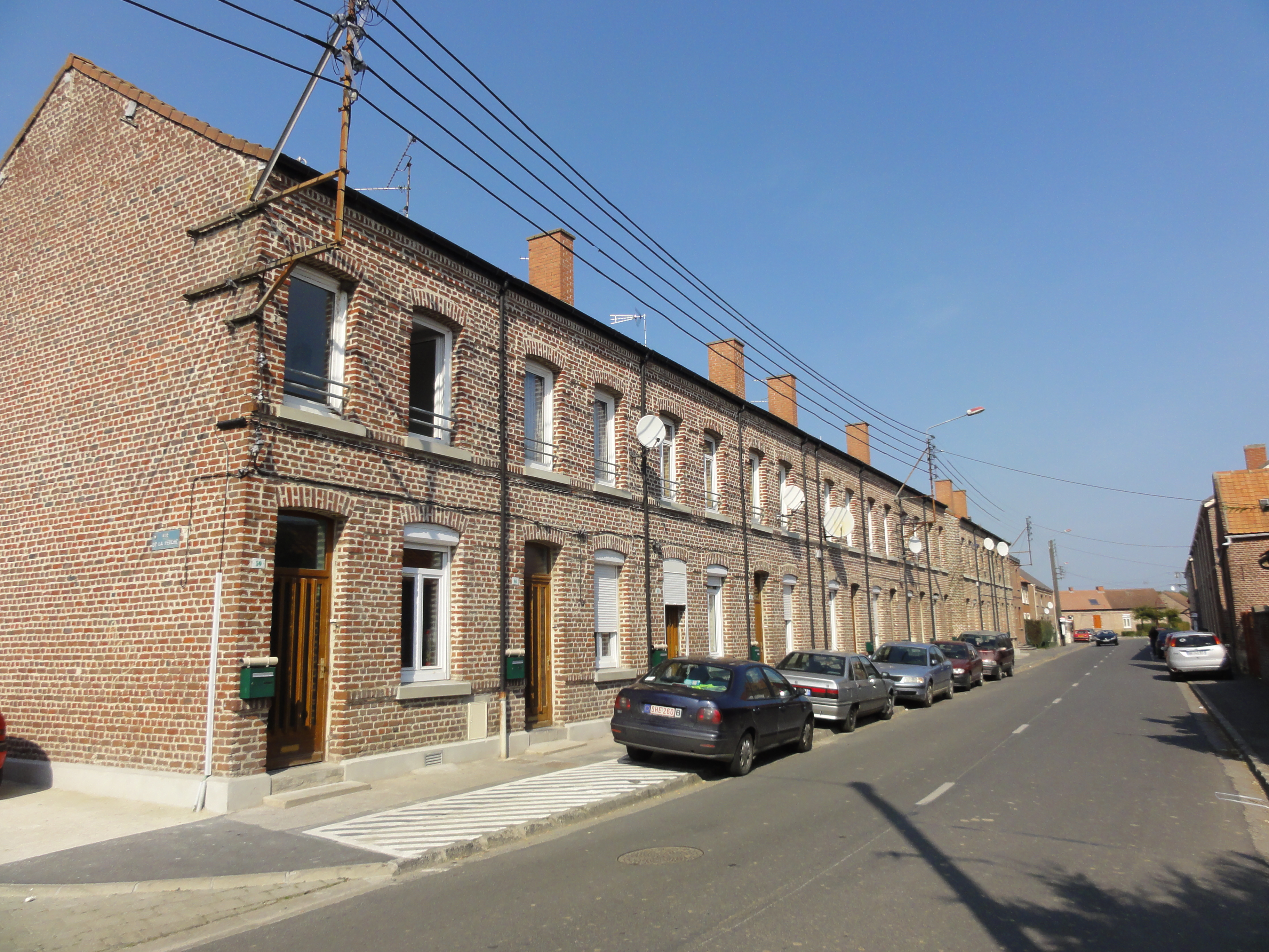 Cité Saint-Pierre de la fosse Saint-Pierre de la Compagnie des mines de Thivencelle dans le bassin minier du Nord-Pas-de-Calais, Thivencelle, Nord, Nord-Pas-de-Calais, France.